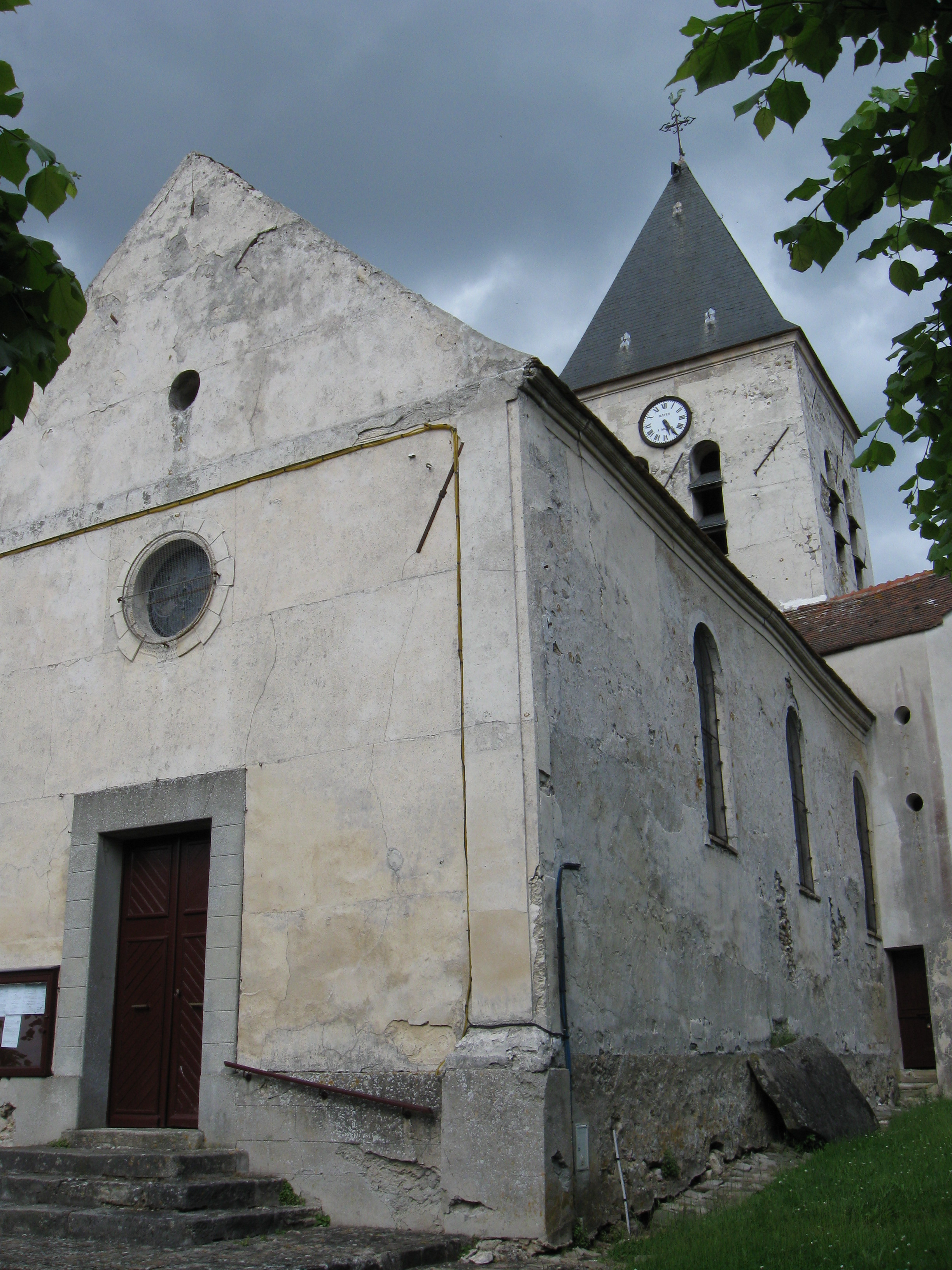 Église Sainte-Geneviève de Jaignes. (département de la Seine-et-Marne, région Île-de-France).